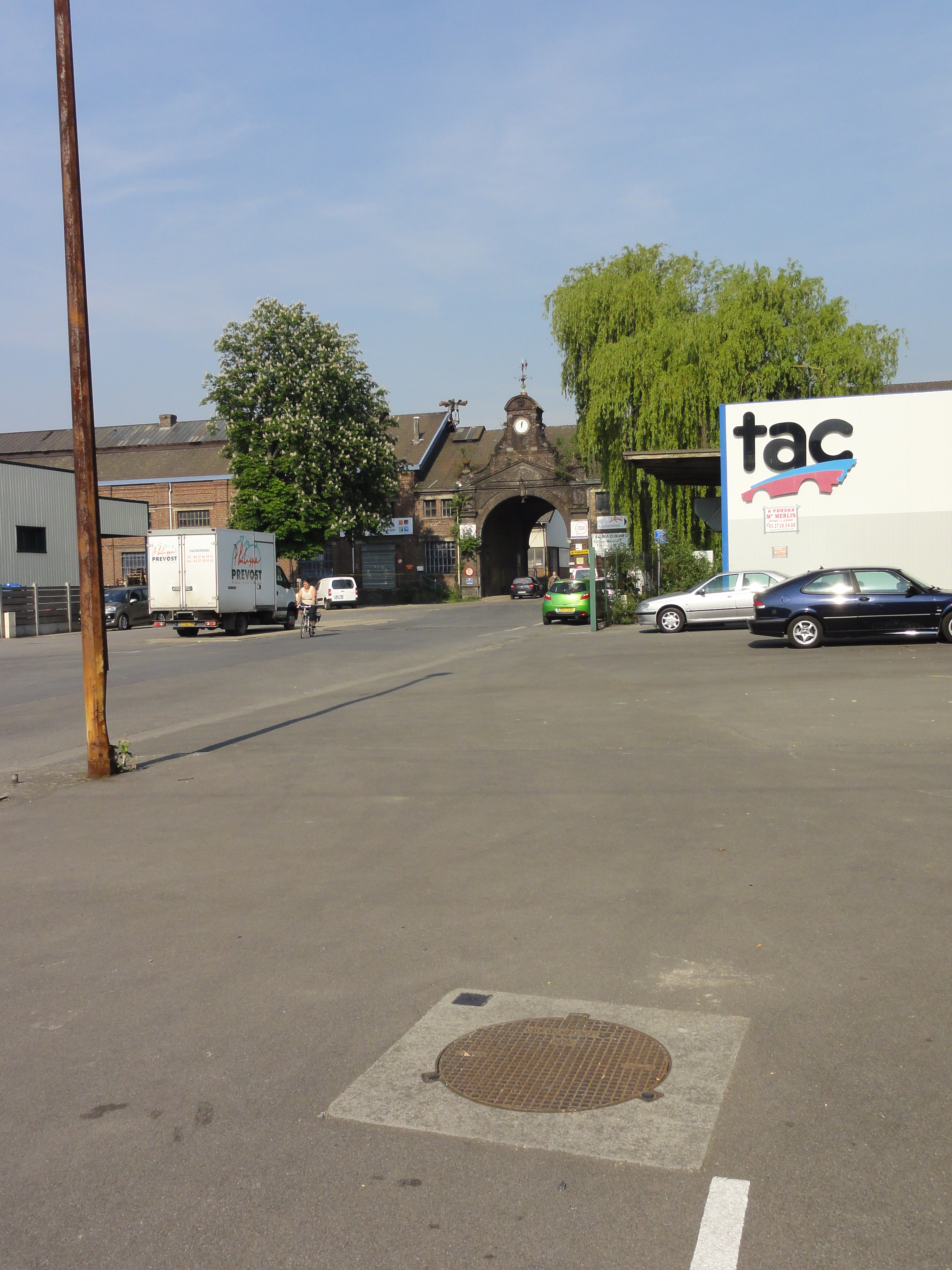 La fosse du Pavé de la Société Desandrouin-Taffin puis de la Compagnie des mines d'Anzin était un charbonnage du bassin minier du Nord-Pas-de-Calais constitué de deux puits situé à Anzin, Nord, Nord-Pas-de-Calais, France.